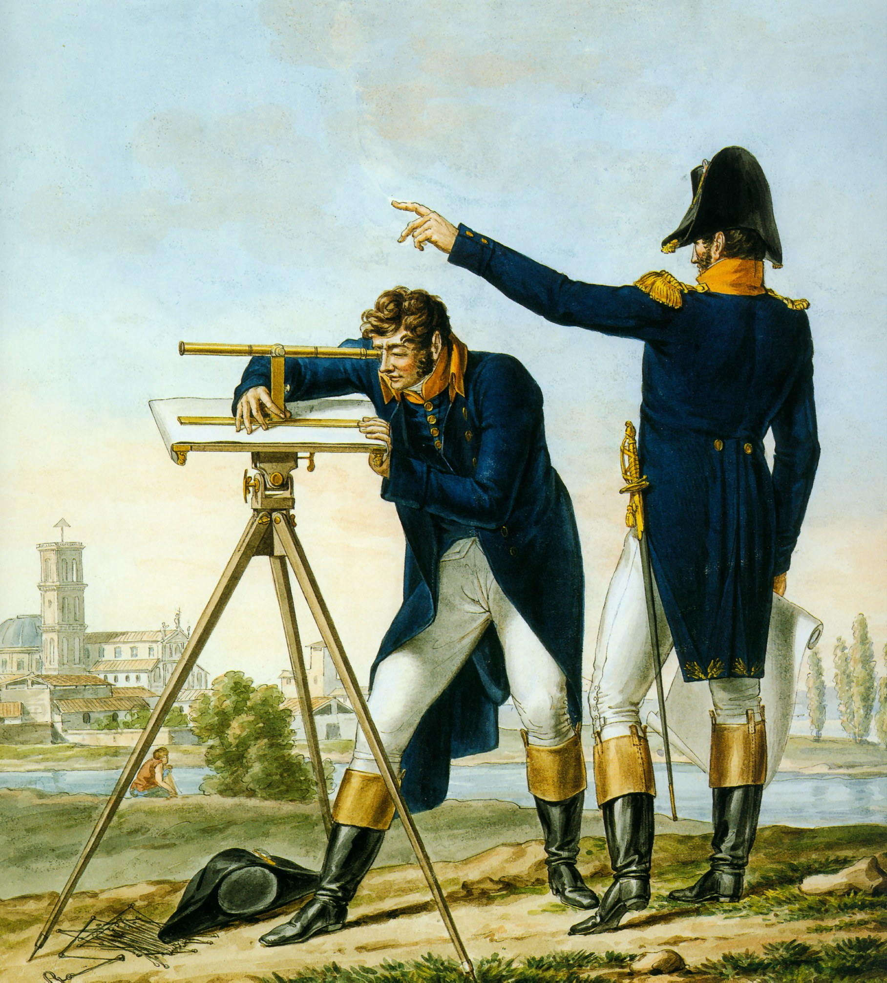 Part of a series chronicling the uniforms of Napoleon's Grande Armée.